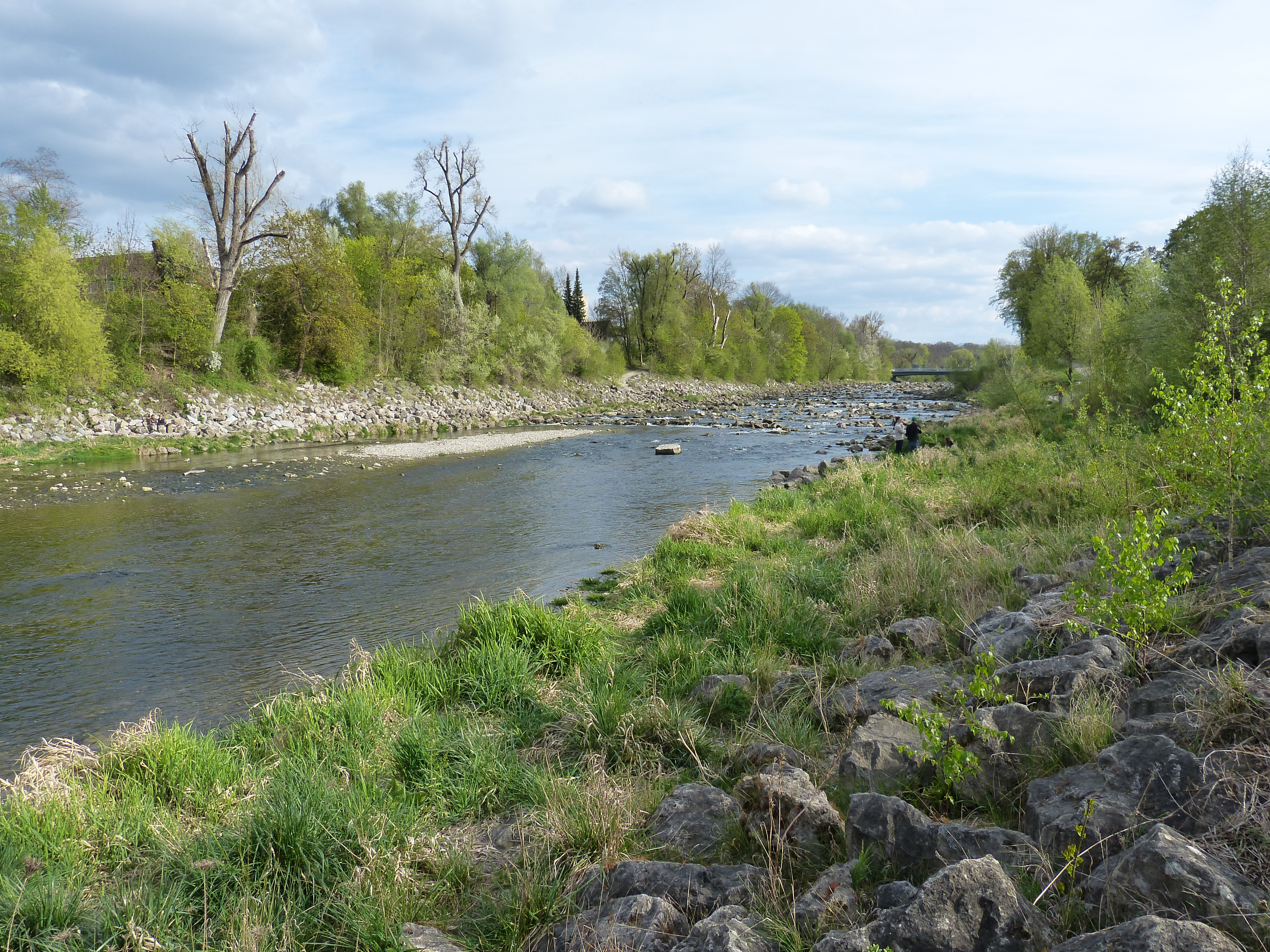 Die Wertach in Augsburg von der Stelle der ehemaligen Goggelesbrücke in Richtung Süden fotografiert. In der Ferne sichtbar ist die Luitpoldbrücke.